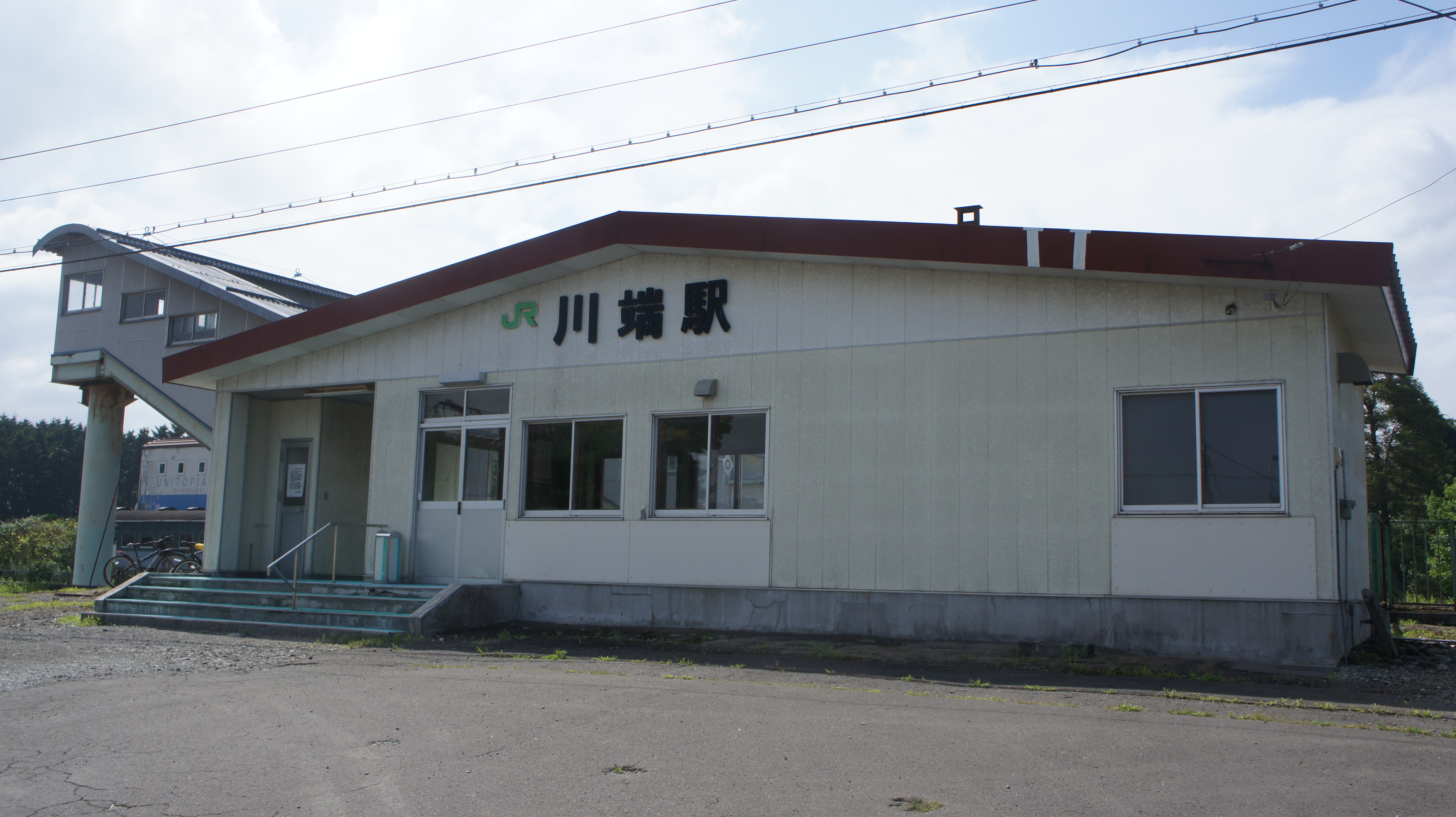 JR石勝線・川端駅の駅舎